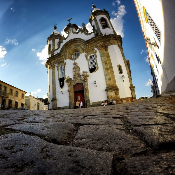 Igreja Nossa Senhora do Carmo